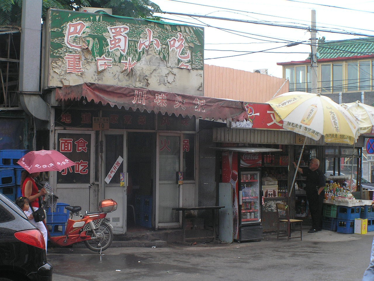 瑠璃廠（リュウリーチャン）大衆食堂と駄菓子屋